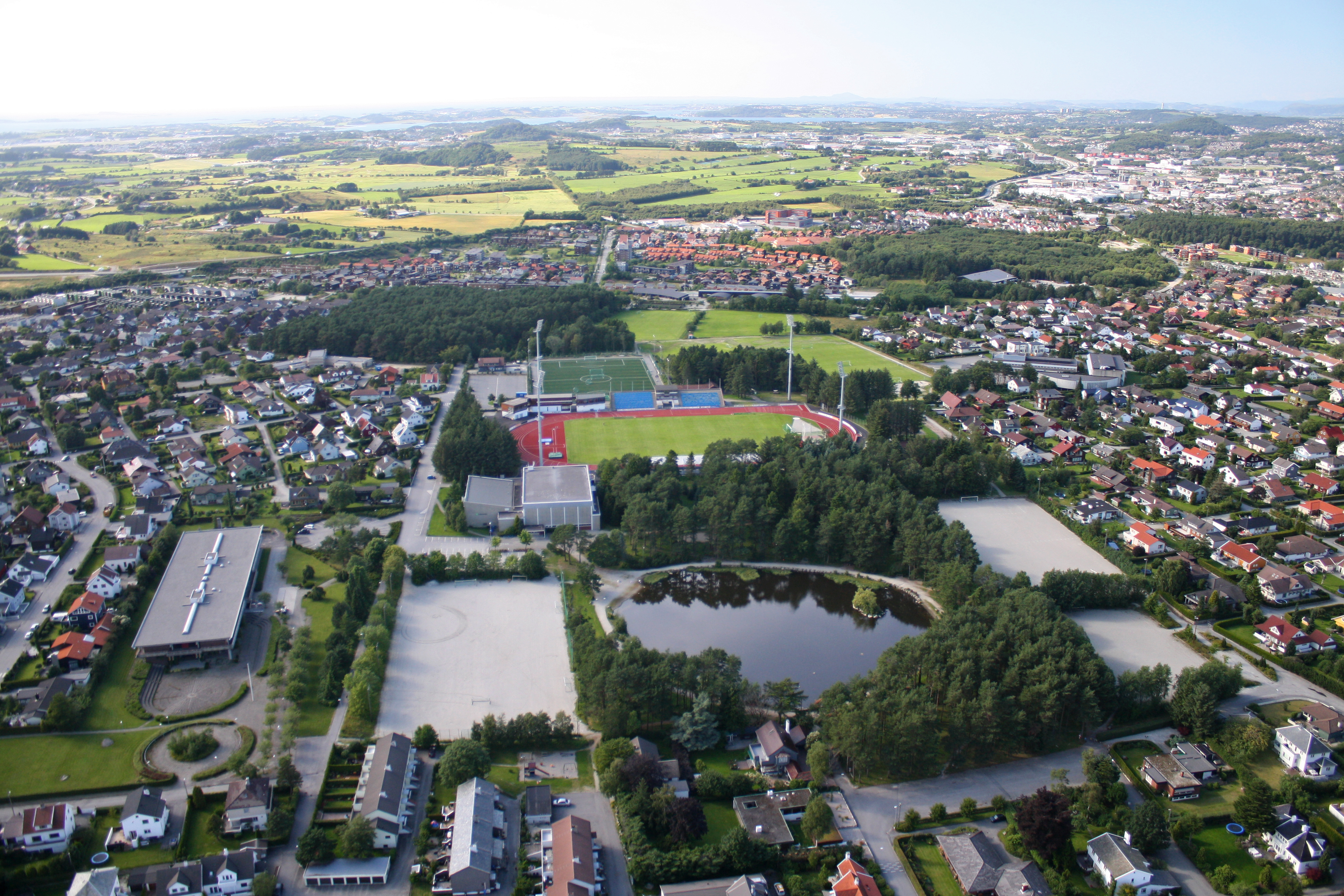 Sandnes idrettspark sett fra øst, med Sandnes stadion i midten.